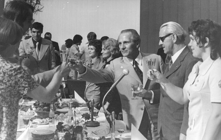 ADN-ZB-Sturm-12.9.1972-sche-Berlin: Empfang für Olympiakämpfer. Für die Teilnehmer der DDR an den XX. Olympischen Sommerspielen 1972 gaben das ZK der SED und deer Ministerrat der DDR in der Dynamosporthalle einen festlichen Empfang. Zusammen mit dem Ersten Sekretär des ZK der SED, Erich Honecker (3.v.r.), dem Vorsitzenden des Ministerrates der DDR, Willi Stoph (2.v.r.), Mitglied des Politbüros des ZK, dem Minister für Volksbildung, Margot Honecker (4.v.r.), stoßen die erfolgreichen Olympioniken Angelika Bahmann (r.), Karin Janz (5.v.r.), Wolfgang Nordwig (3.v.l.) und Frank Forberger (2.v.l.) an.